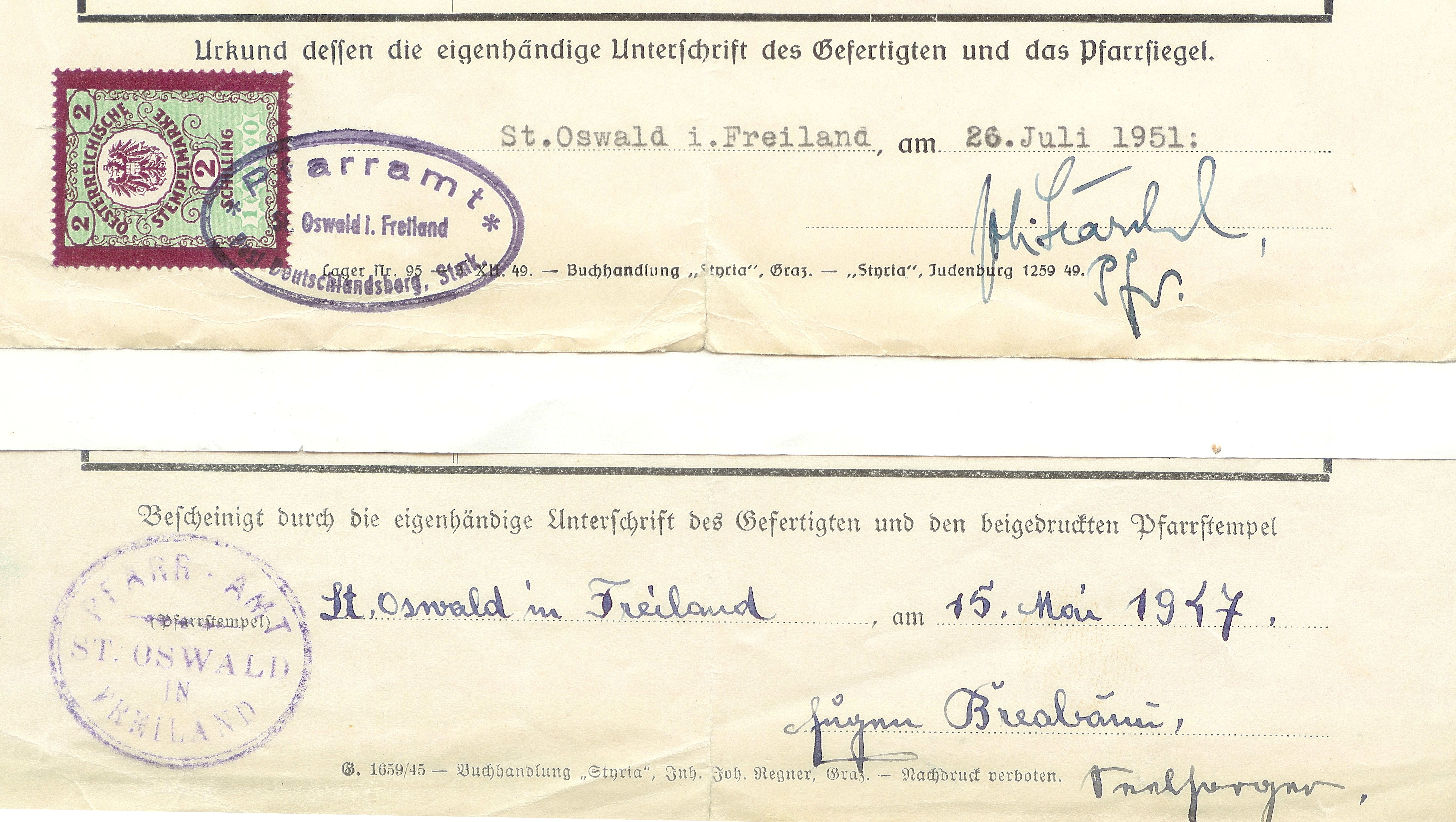 Zusammenstellung zweier Belege für die in der Praxis unsichere Schreibweise des Namens der Pfarre „St. Oswald in Freiland“, Steiermark, Österreich (nicht „im“, nicht „ob“, kein externer Namenszusatz. Die Funktionen der Amtsinhaber sind öffentlich, daher kein persönlicher Datenschutz der (im übrigen verstorbenen) Amtsinhaber